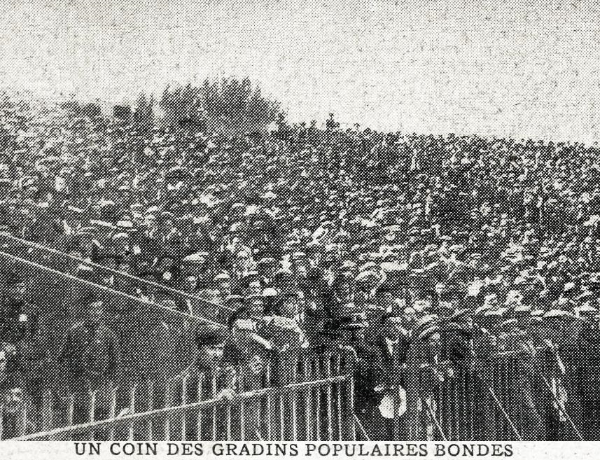 Finale de fooball aux JO de 1924 à Paris, une partie des 41000 spectateurs à Colombes.